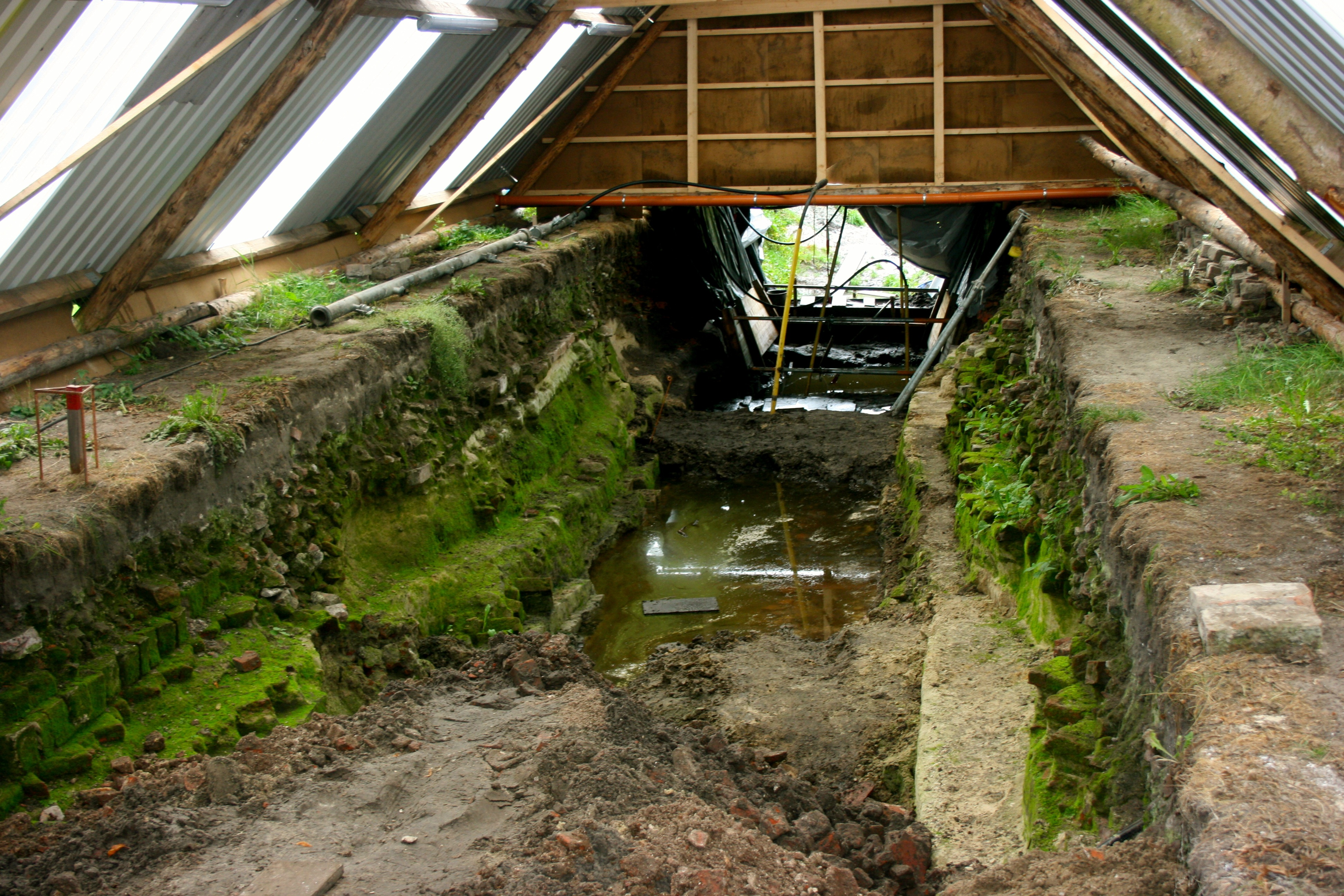 Archäologishce Grabungen in Ihlow (2007)